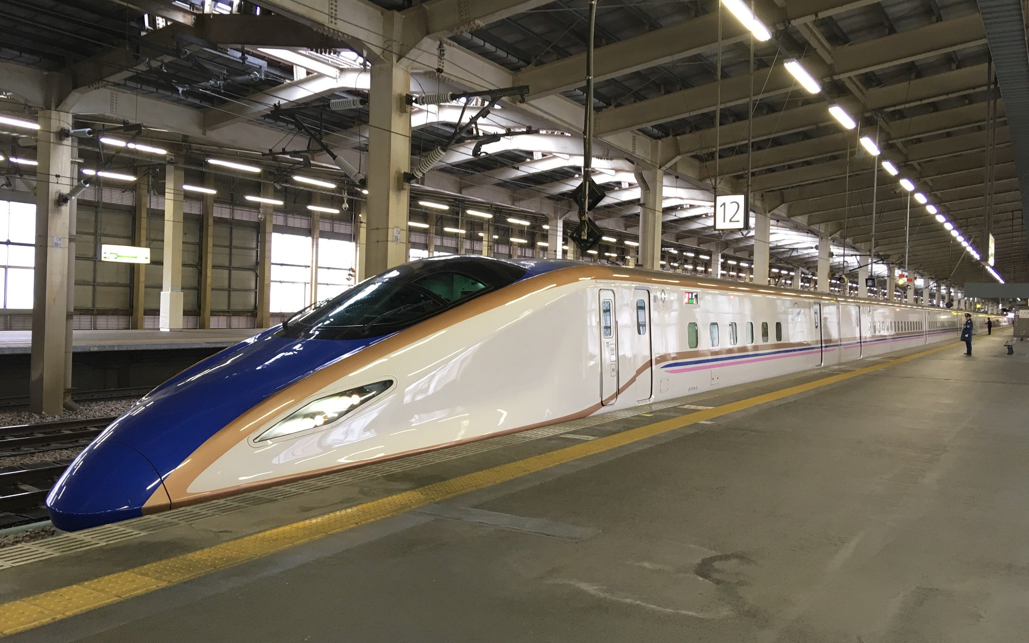 北陸新幹線タイプとは違い、ピンク色の帯が入っている。